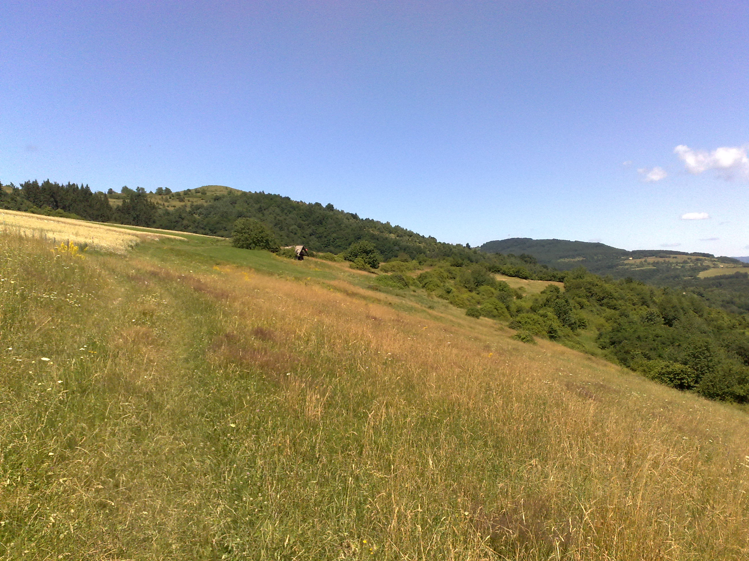 Pohľad na Jasenia a Javor z doliny Budinského potoka